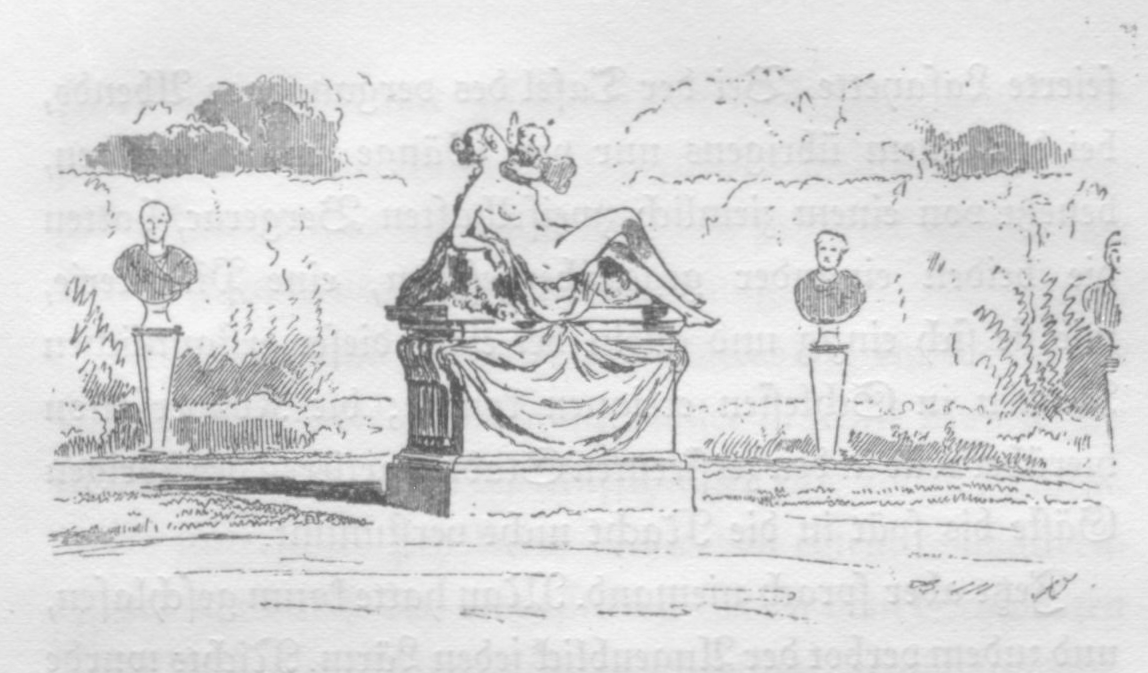 „Tage des Königs“ von Bruno Frank, Erstausgabe von 1924, Vignette von Adolph von Menzel zu dem Kapitel „Alkmene“.